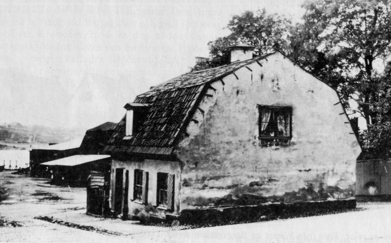 Parmmätarhuset vid nuvarande Kungsholms hamnplan